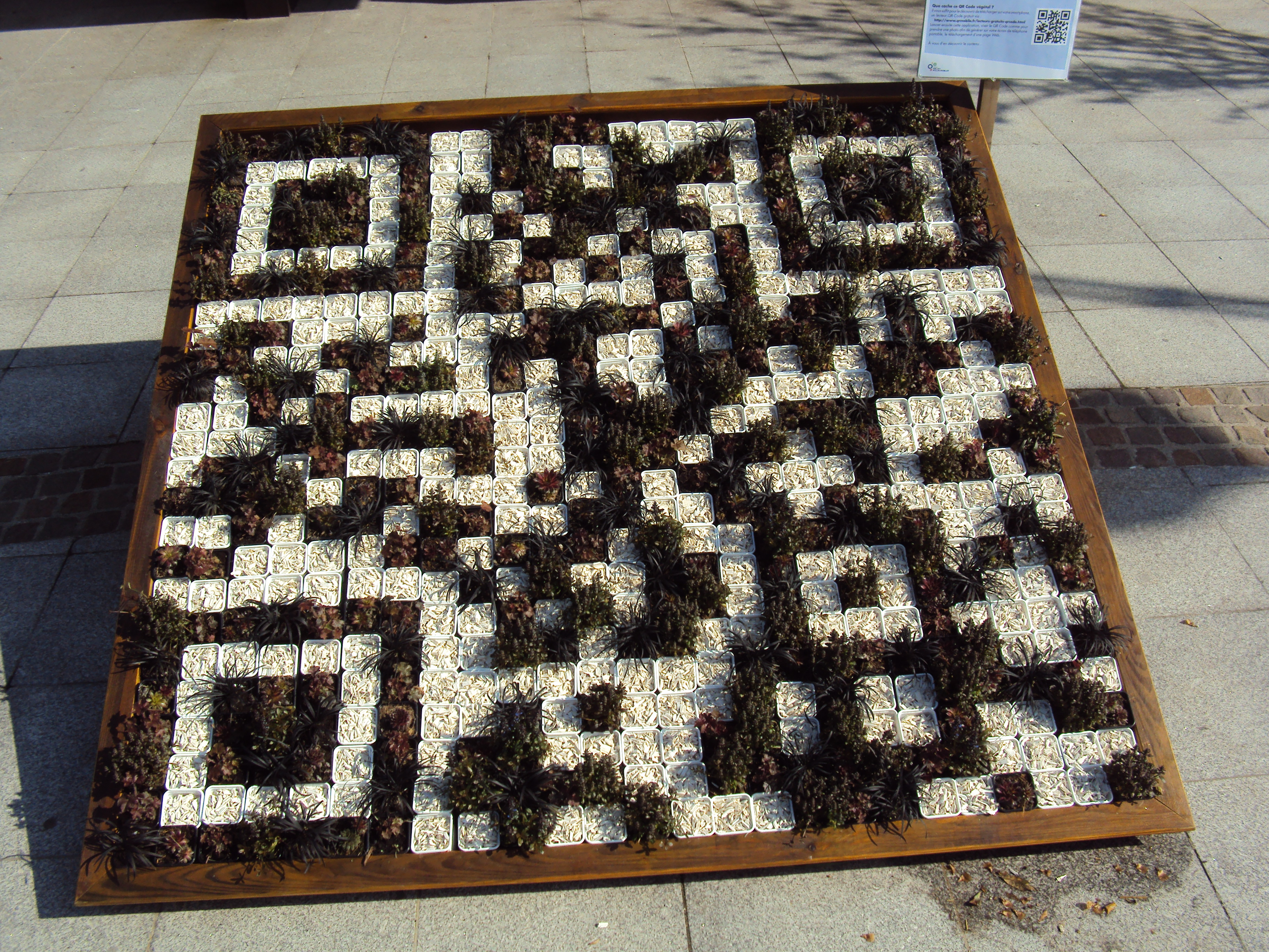 Vélizy - Hôtel de Ville - QR Code [1] végétal installé devant la mairie